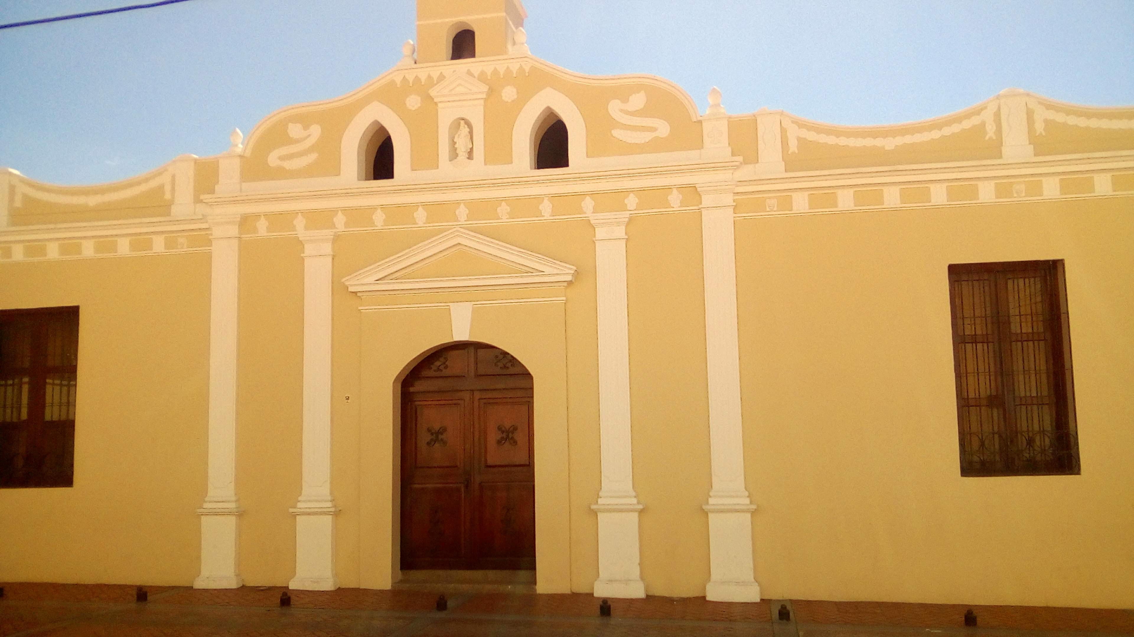 Colegio tridentino de Comayagua